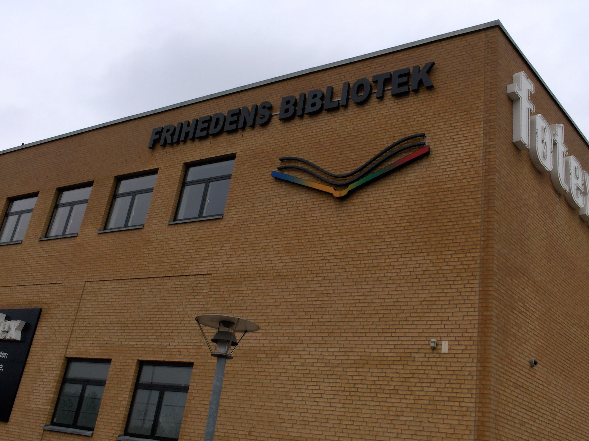 Frihedens Bibliotek i Frihedens Butikscenter